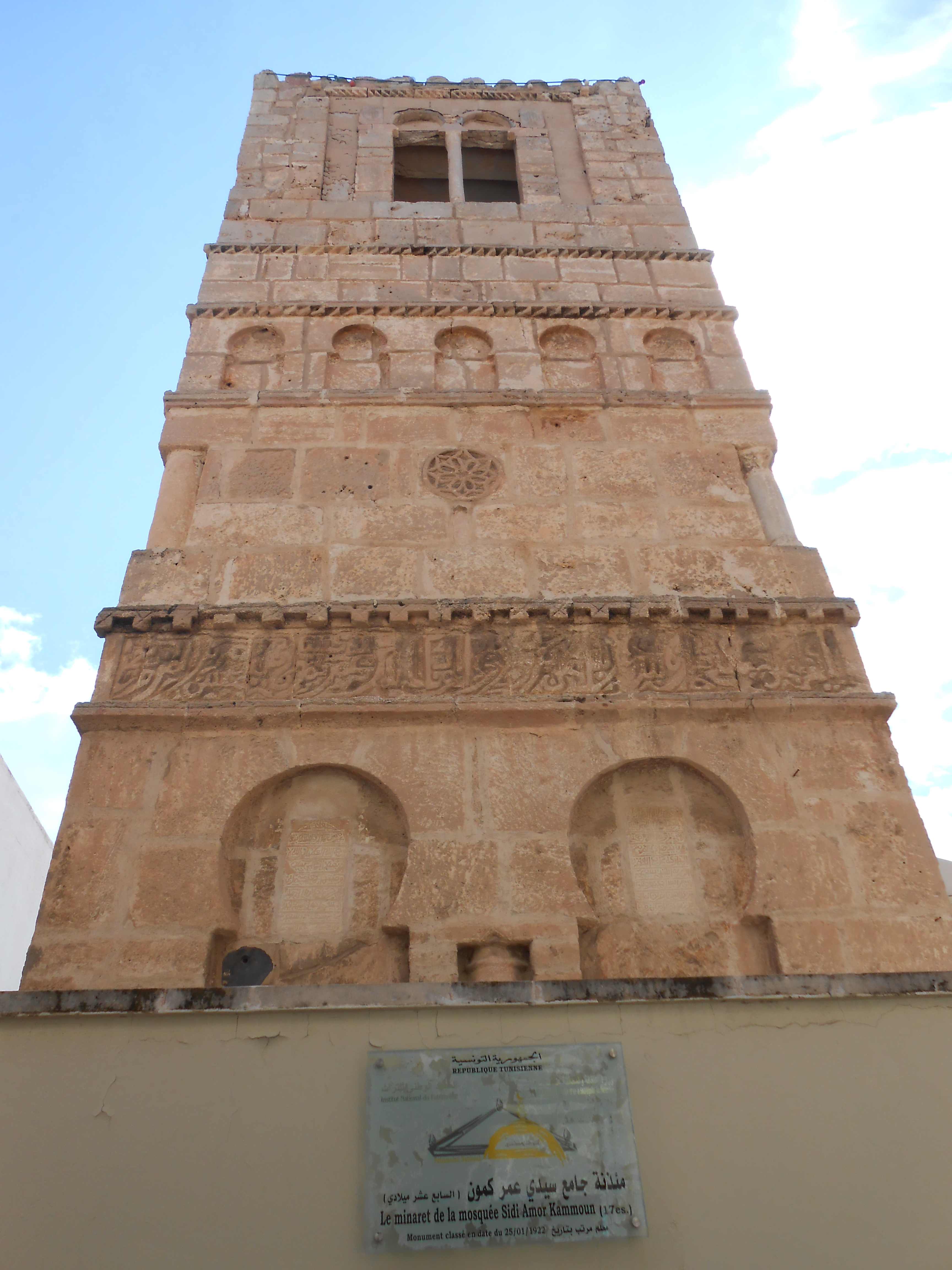 Mosquée de Sidi-Amor